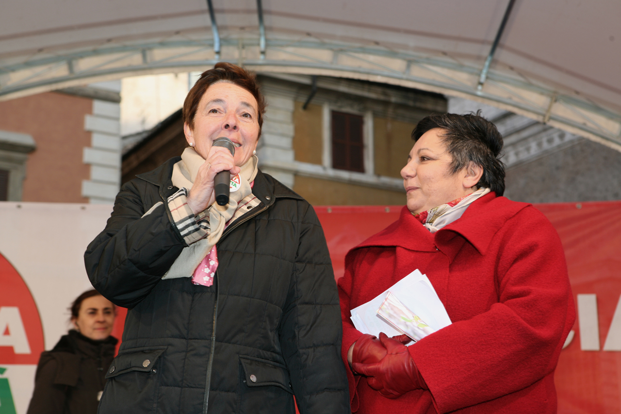 Grazia Francescato, portavoce nazionale dei Verdi e rappresentante di spicco di Sinistra e Libertà, parla sul palco di Piazza Farnese in occasione della presentazione della lista.